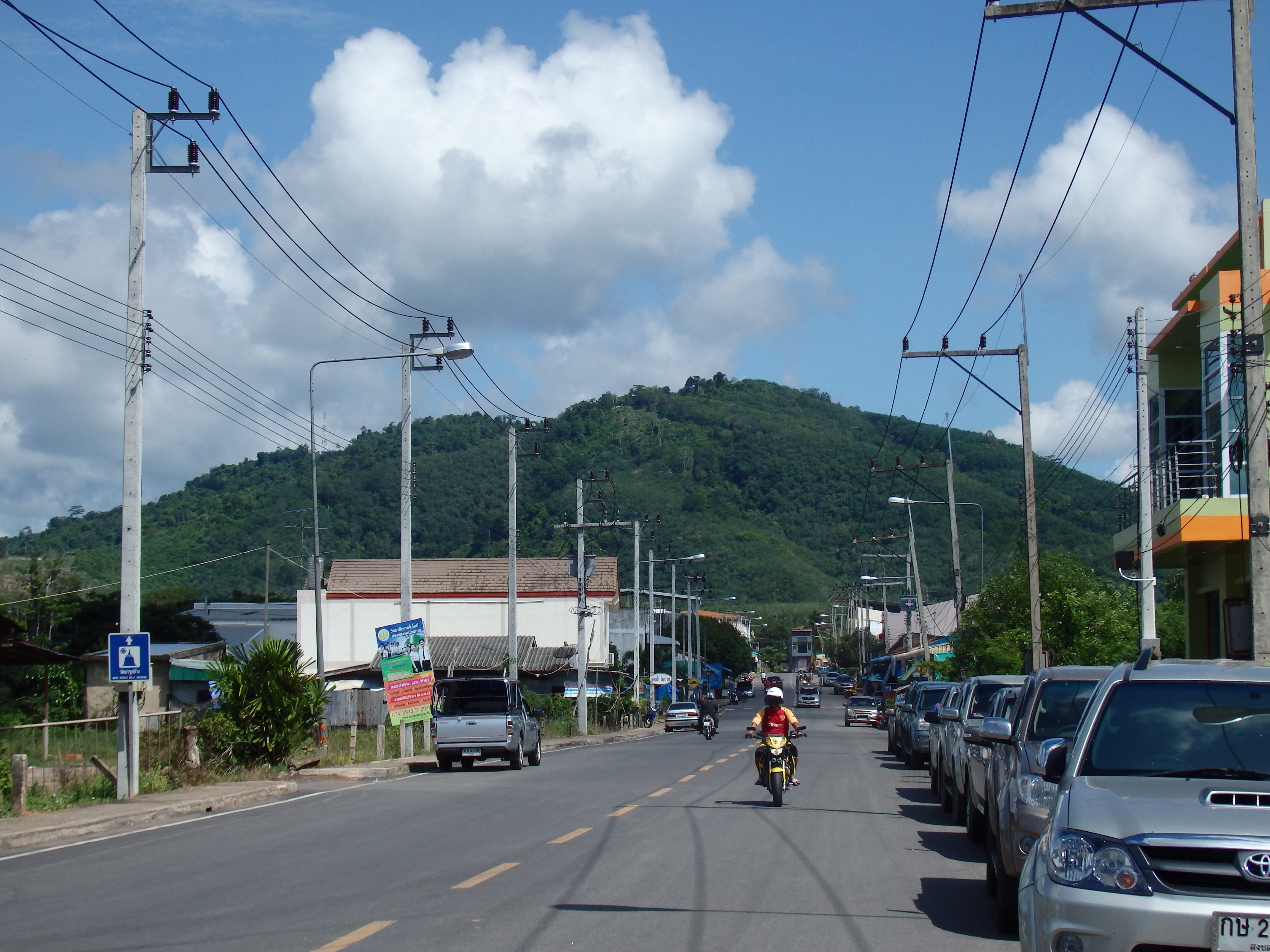 Padangbesa, Sadao District, Songkhla, Thailand